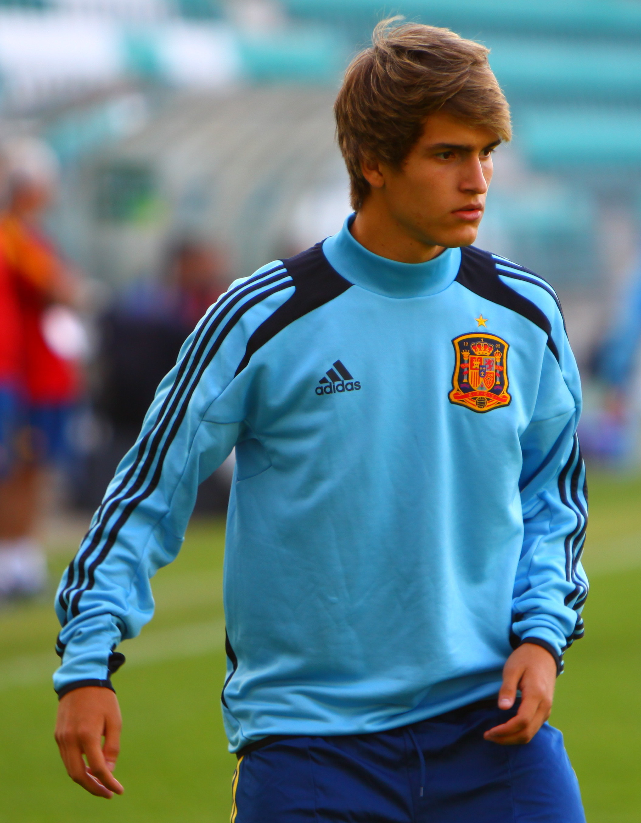 U-19 Portugal vs Spain.